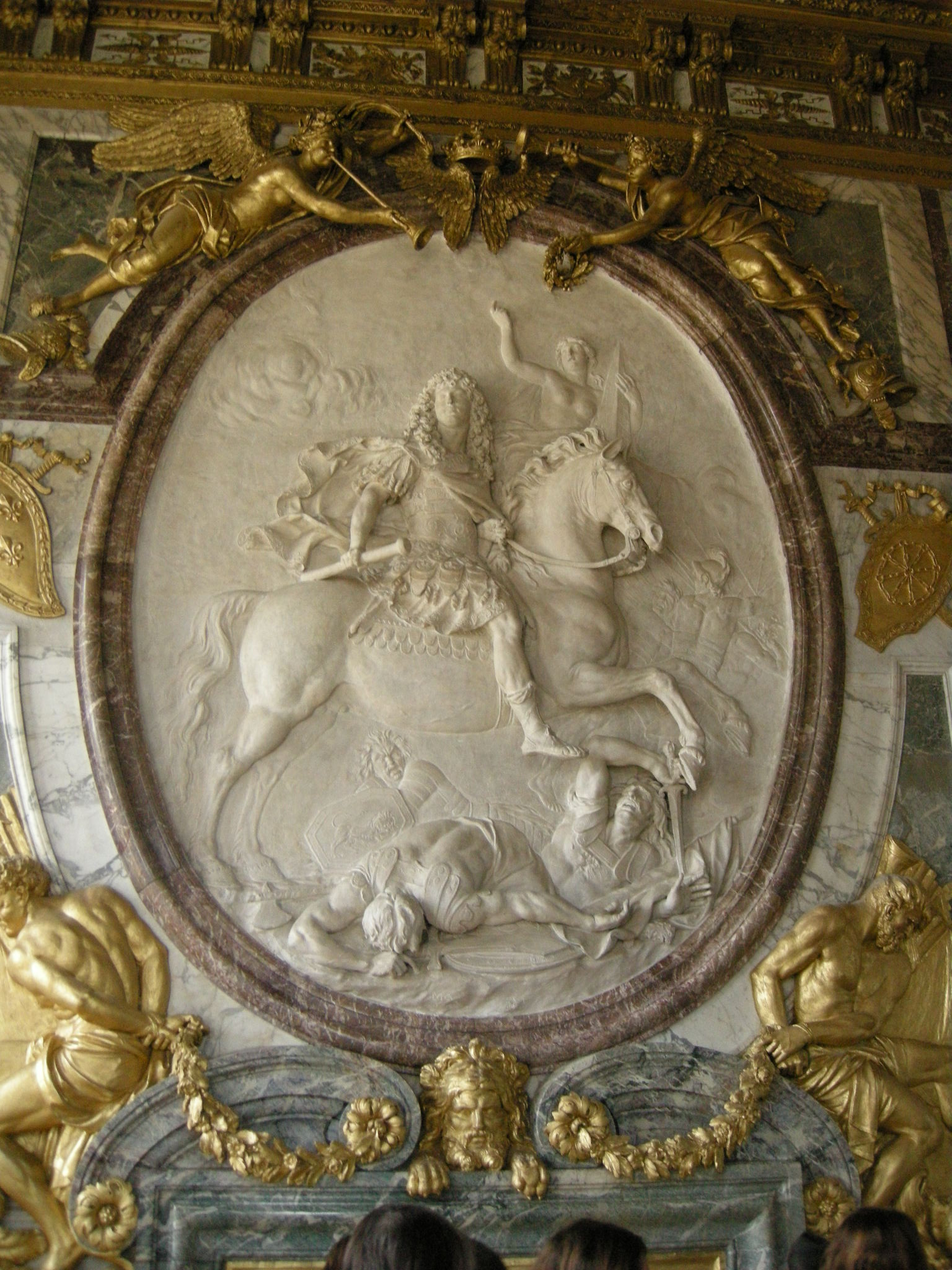 Versailles, sala della guerra, stucco con luigi XIV di Antoine Coysevox